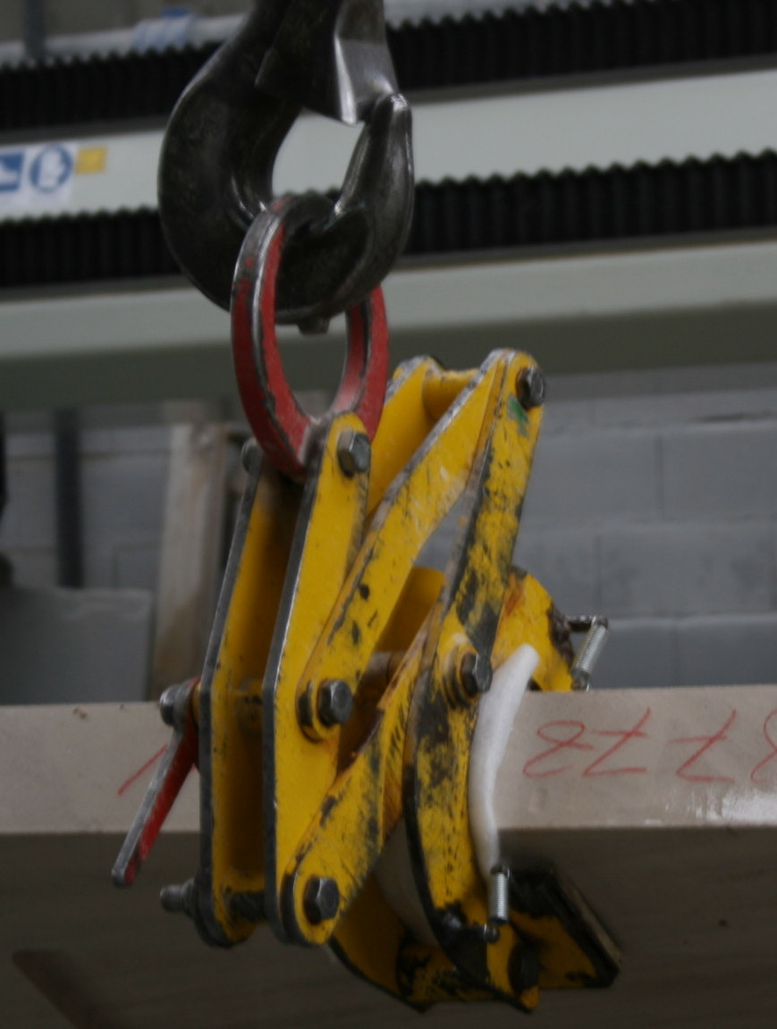 Steinschere